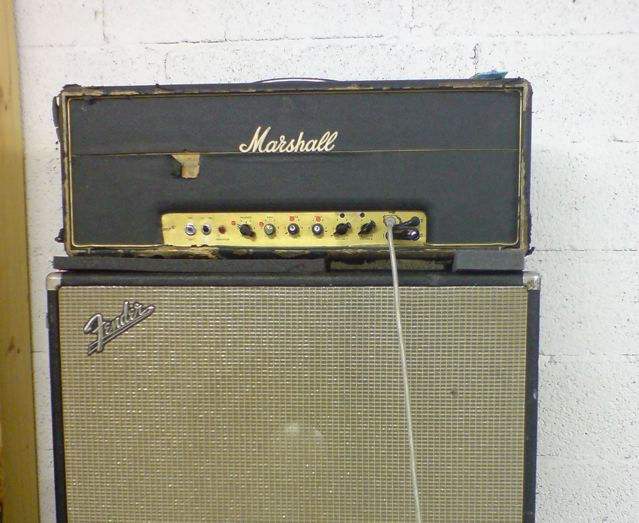 Marshall kitaravahvistin 2